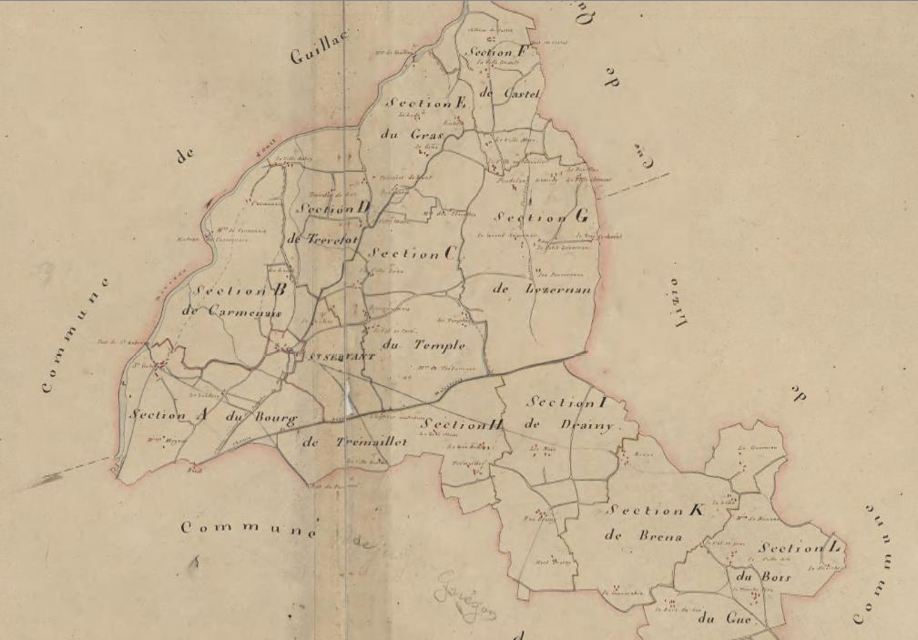 Plan d'une commune du Morbihan ( Saint Servant) de 1830 démarquant les principaux lieu du village.